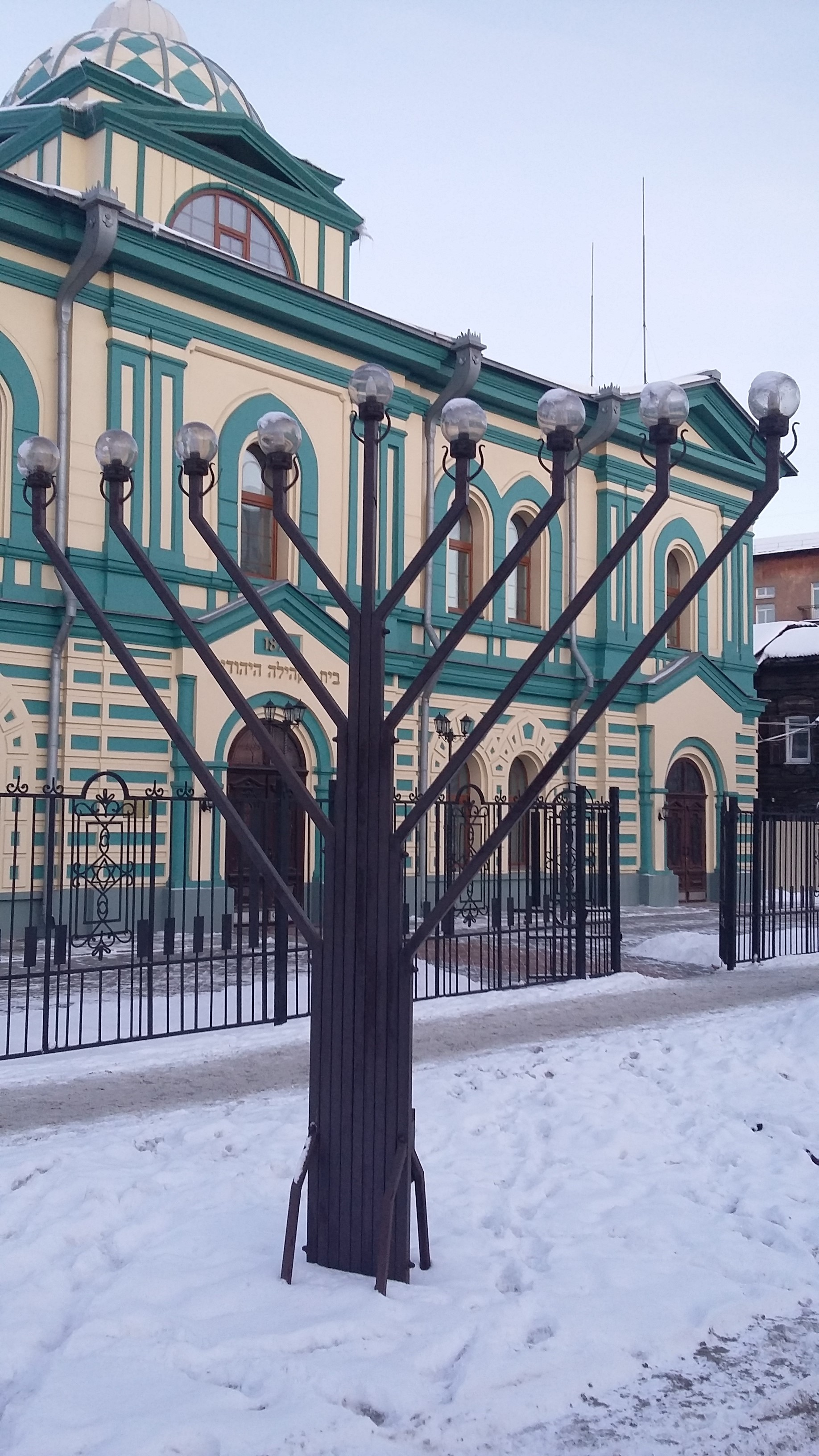 Уличный фонарь в форме ханукии рядом с домом еврейской общины (синагогой) в городе Иркутске, Россия.